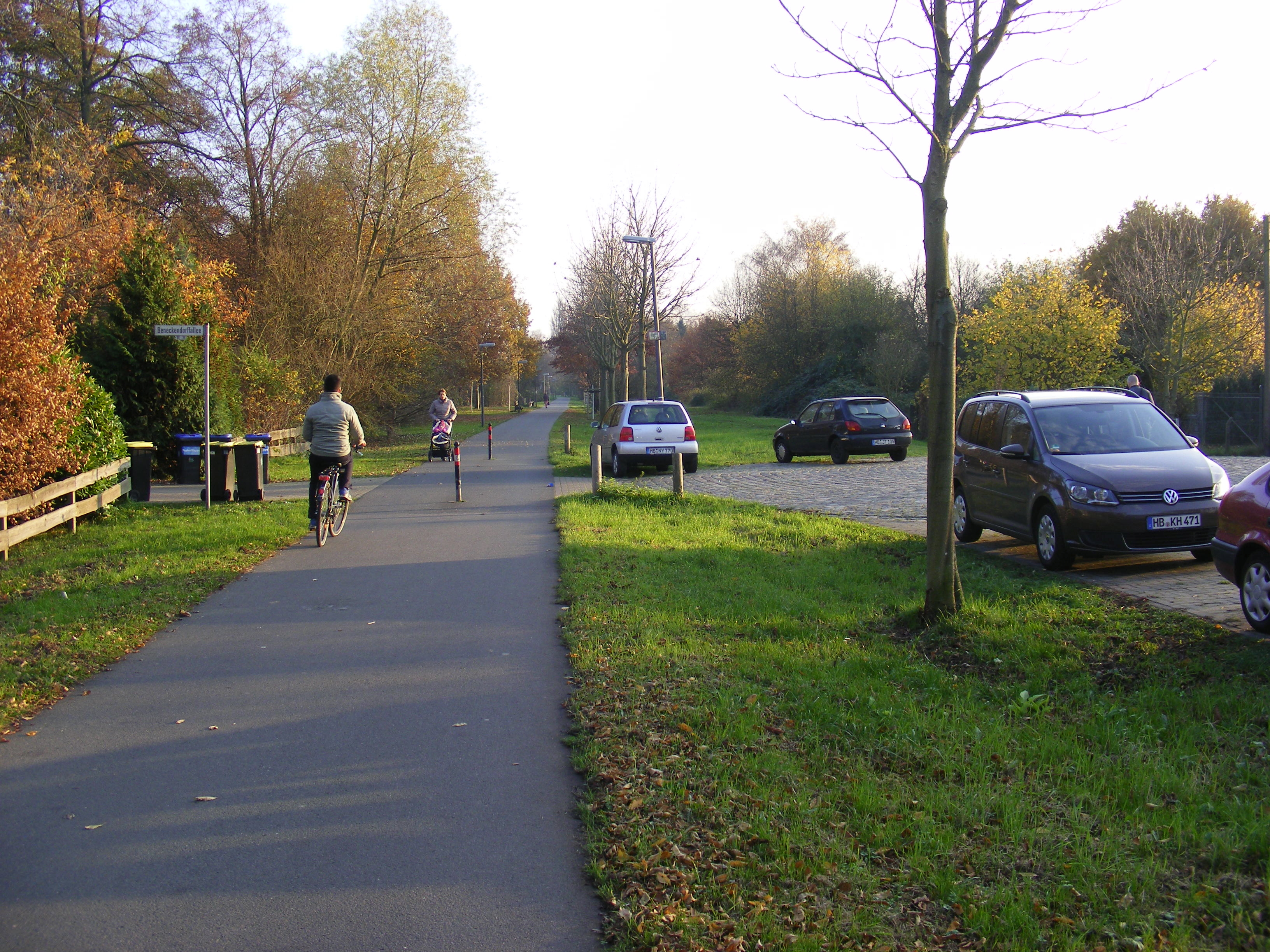 Bremen: Die Beneckendorfallee ist mit ihrem lagen (fast) autofreien Teil eine attraktive und wichtige Veloroute